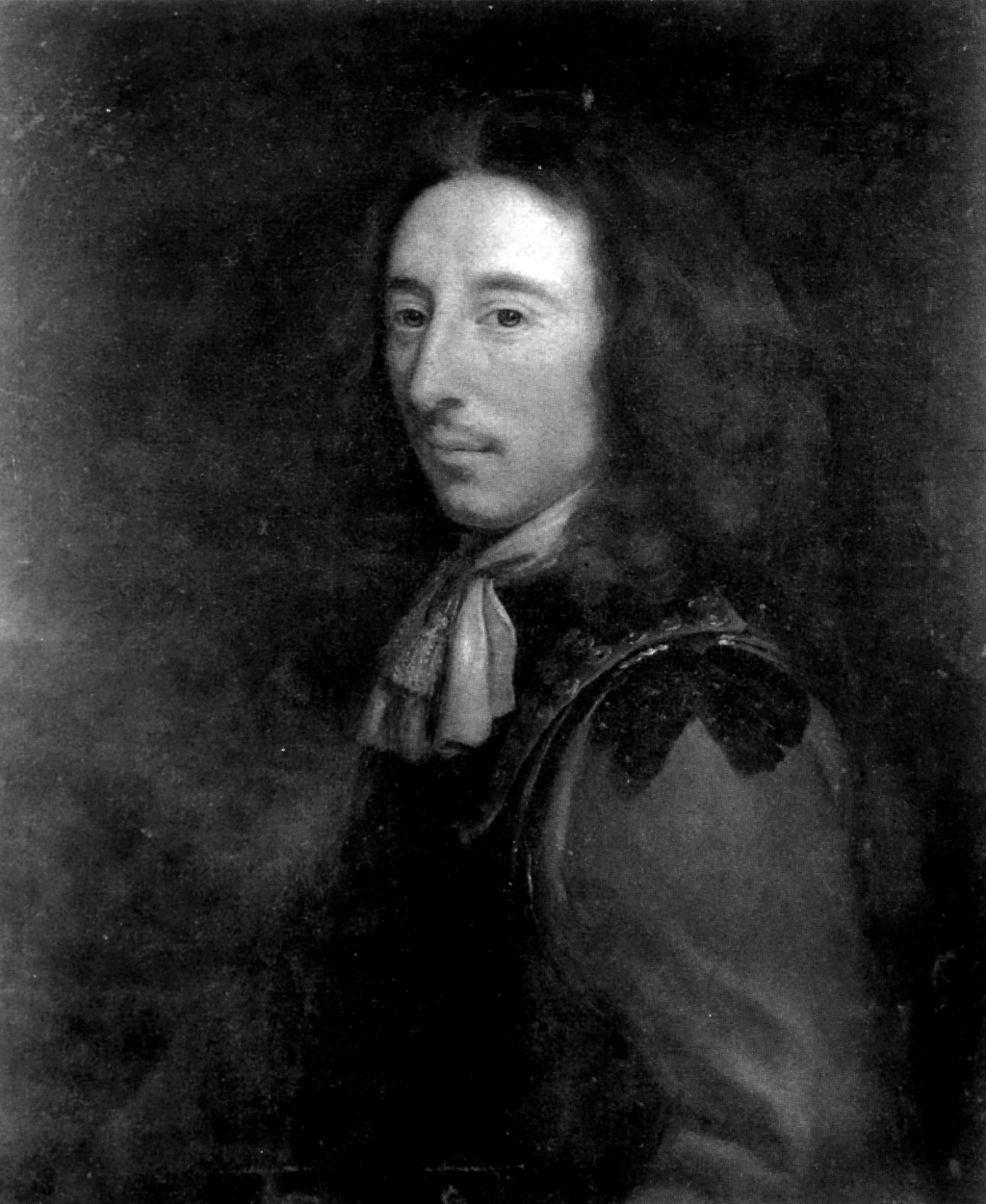 Algernon Sydney (1622-1683)